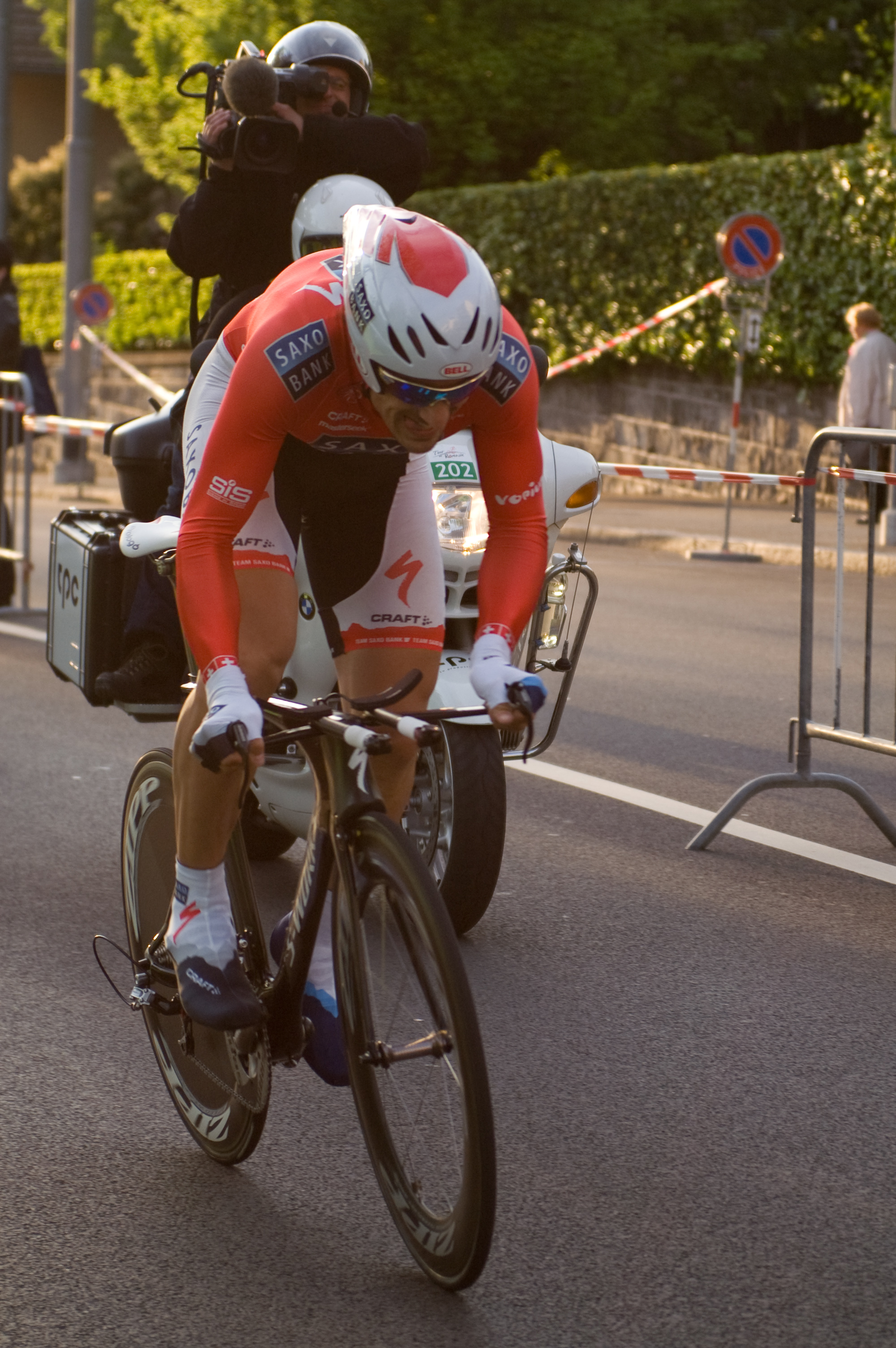 Fabian Cancellara au Tour de Romandie 2009 - prologue